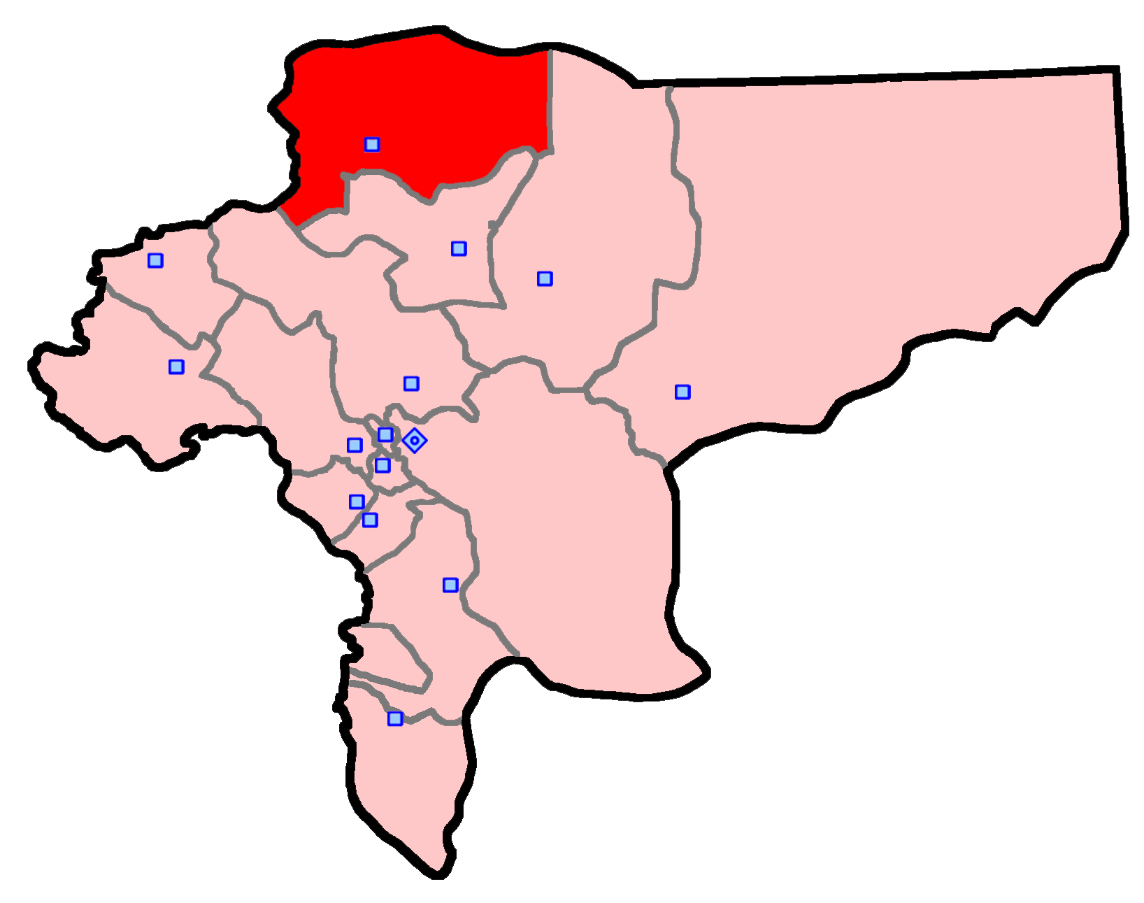 حوزهٔ انتخاباتی کاشان و آران و بیدگل برای انتخابات مجلس شورای اسلامی